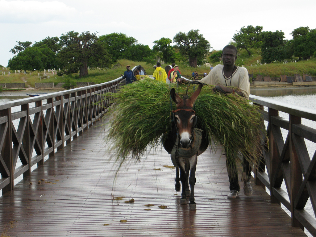 Ane sur la passerelle reliant Joal à Fadiouth, Sénégal